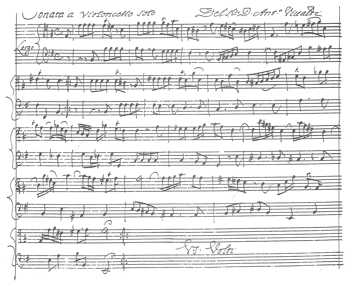 Vivaldi mi minör viyolonsel sonatının Venedikli bir kopist tarafından yazılmış ilk sayfası.